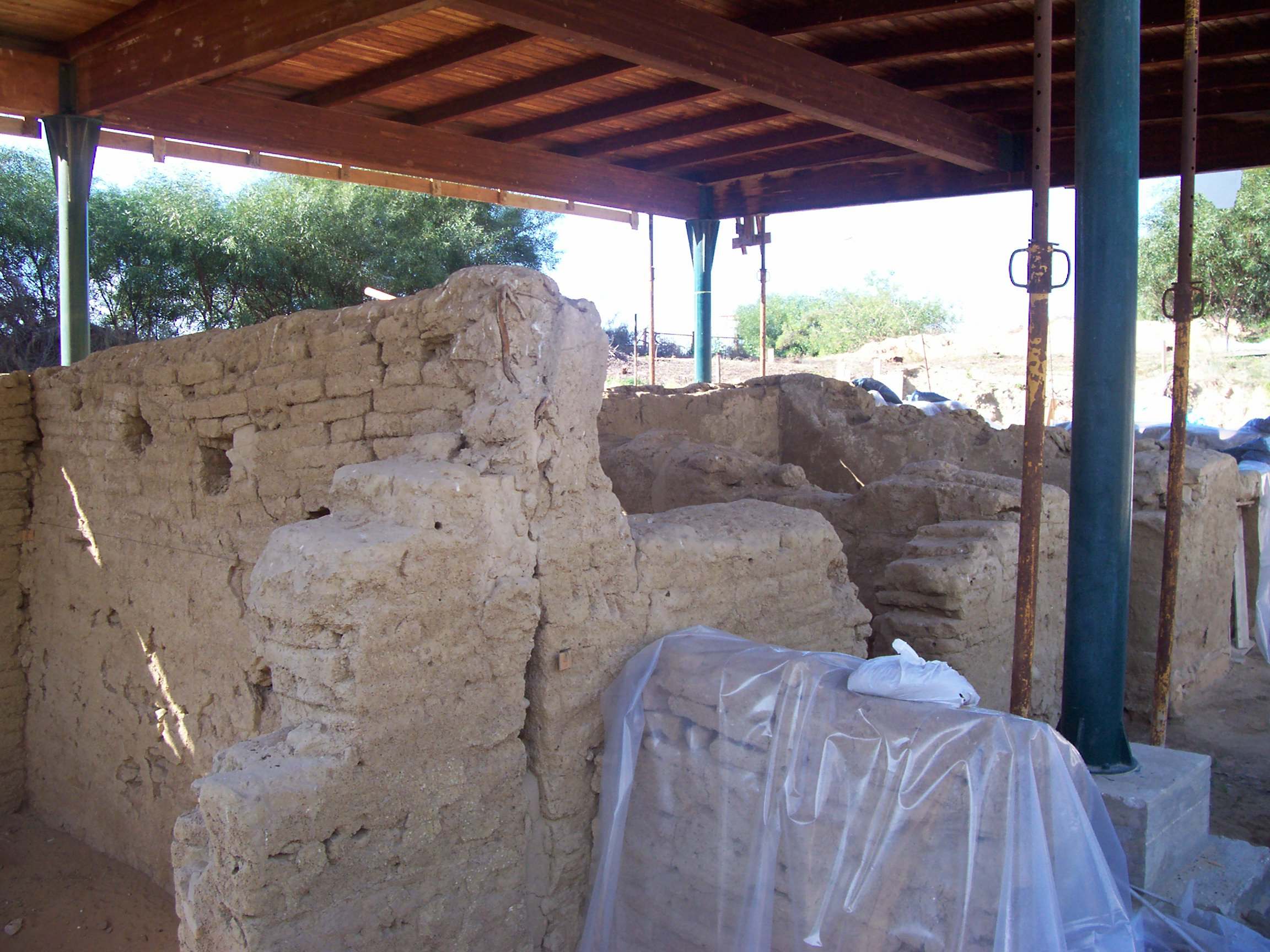 Veduta degli scavi all'Emporio di Gela. Edifici alti fino a tre metri, interamente in mattoni crudi Licensing Categoria:Gela